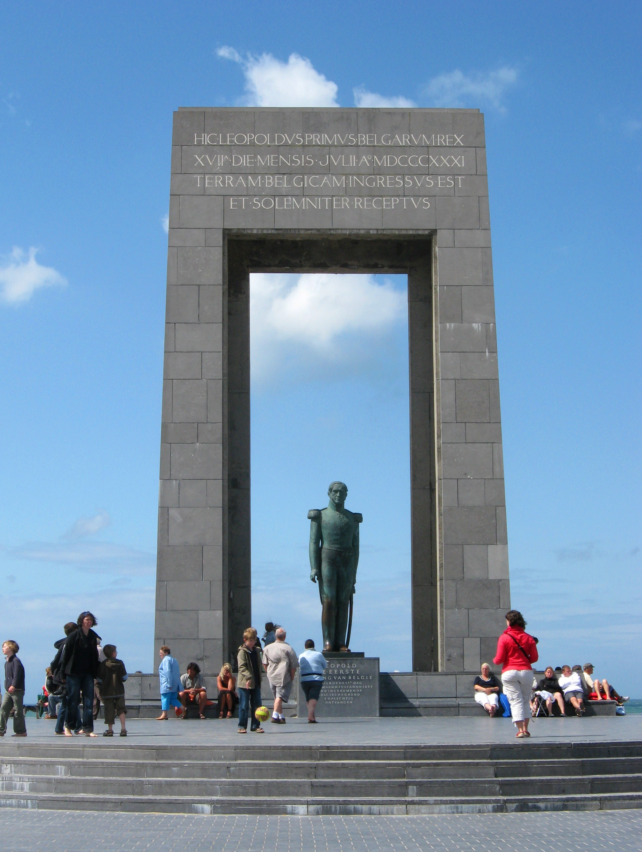 Leopold I of Belgium. (Bildhauer René Cliquet)